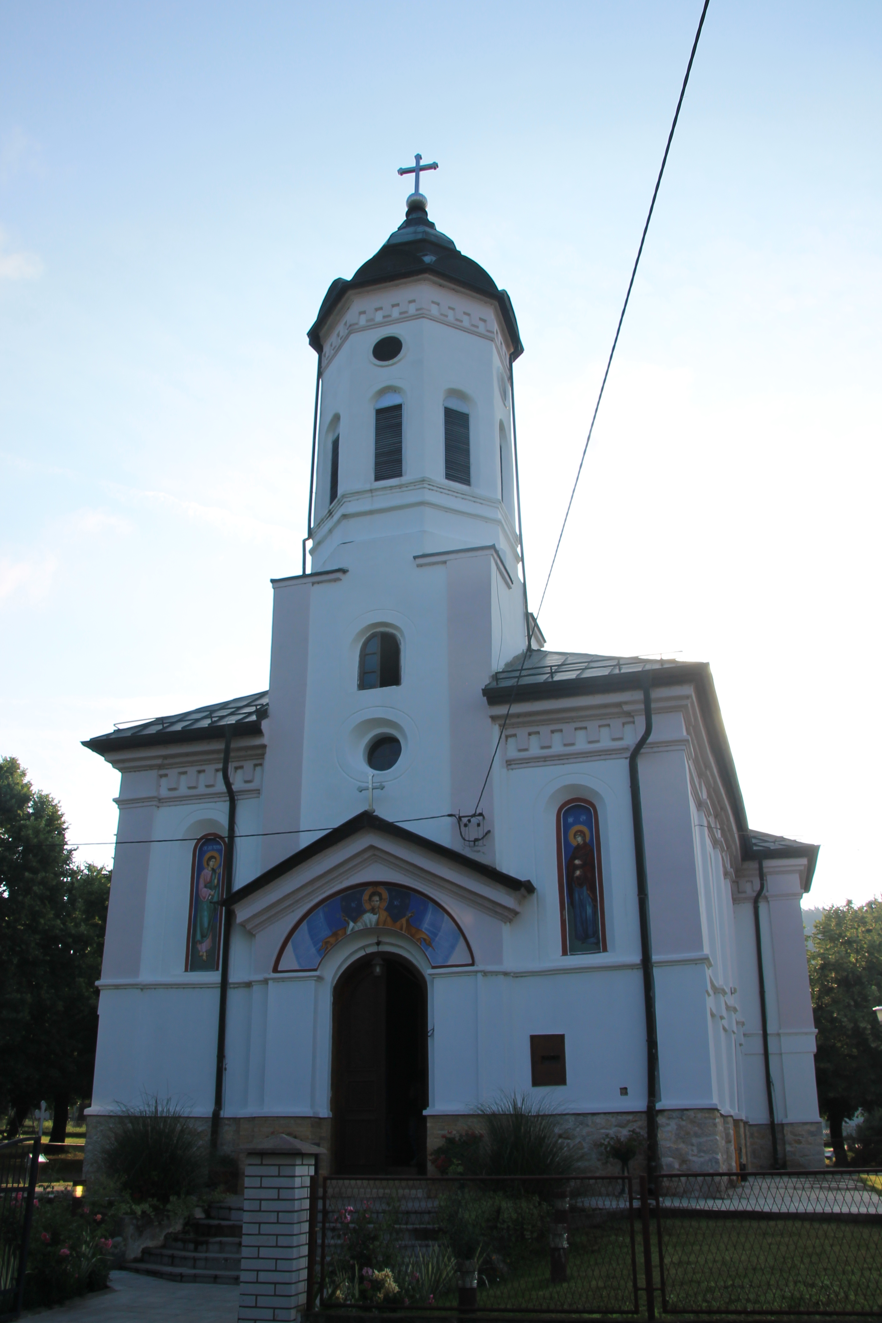 Crkva Sv. apostola Tome (Konatice)